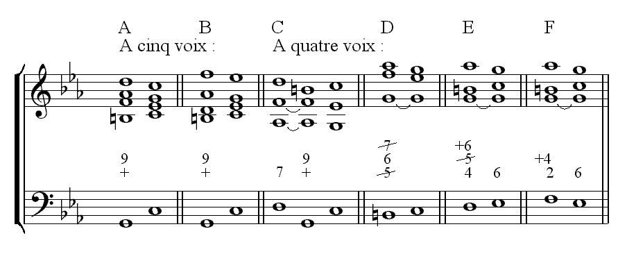 Description : Neuvième mineure de dominante complet - enchaînement ordinaire Source : Personnelle Licence : GFDL